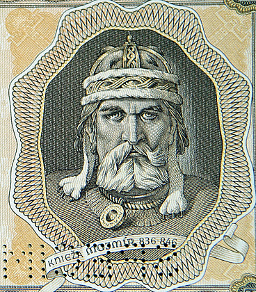 Autorom portrétu kniežaťa Mormíra na 5000 korúnovej bankovke je Jozef Vlček